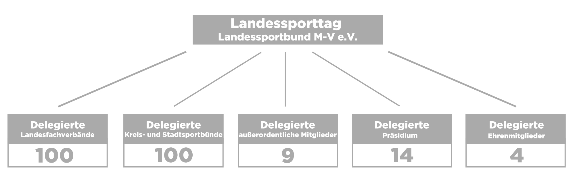 Anzahl der Delegierten des Landessporttages vom LSB M-V e.V.